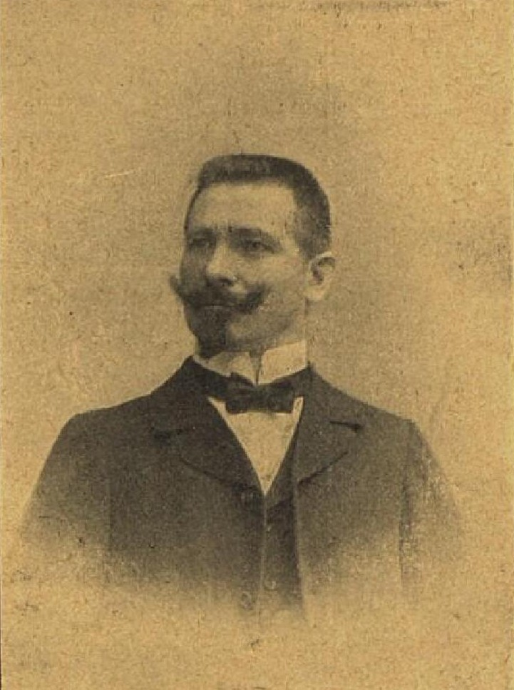 Čeněk Pospíšil (1875-1917), rakouský a český politik